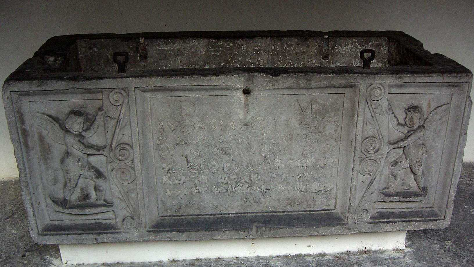 Sarcófago romano depositado en la Catedral de Monza (Italia), considerado de Audasia, con el campo epigráfico muy deteriorado, correspondiente con CIL V 5749 = CIL XI *43,1 = AE 2002, 585: D(is) M(anibus) / Audasiae Q(uinti) f(iliae) Cales / Q(uintus) Audasius Acmazon / VIvir Aug(ustalis) g(ratuito) d(ecreto) d(ecurionum) / Mediol(ani) et Foro Popil(ii) / pater quae vixit / ann(os) V m(enses) IIII dies III